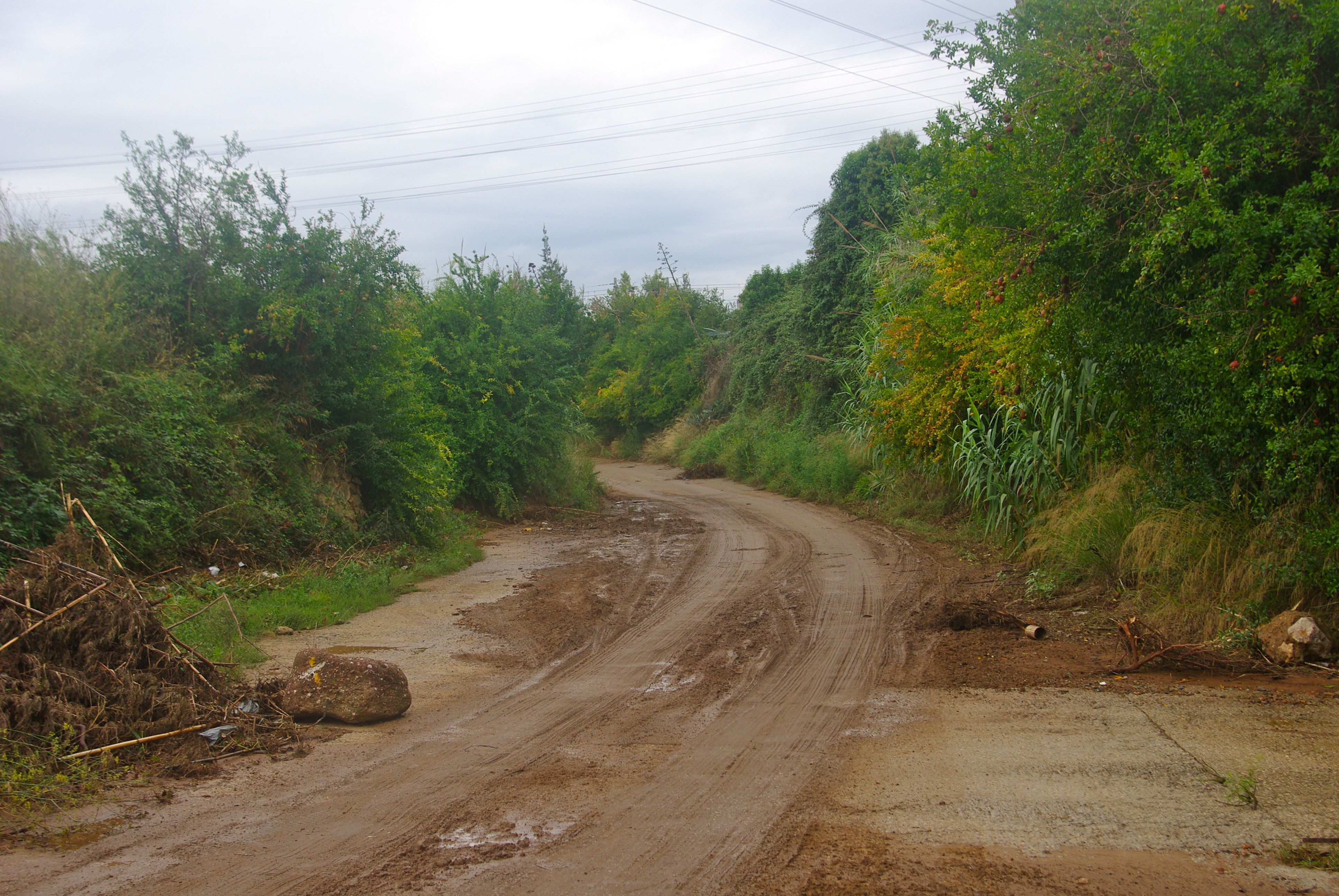 El Camí de Valls, al terme de Reus